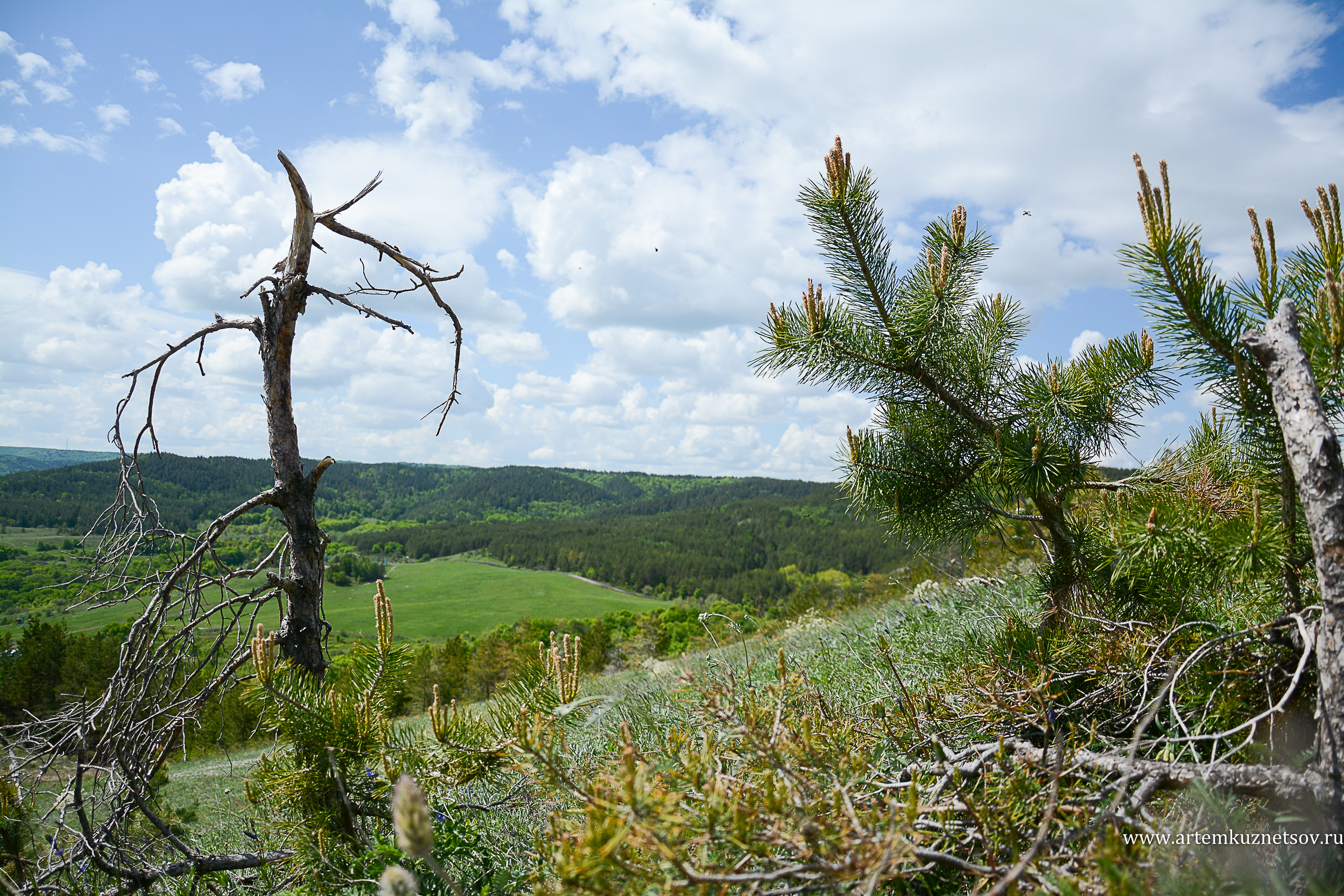 Хвалынский, Хвалынский район This image is related to the protected area of Russia number 6400157